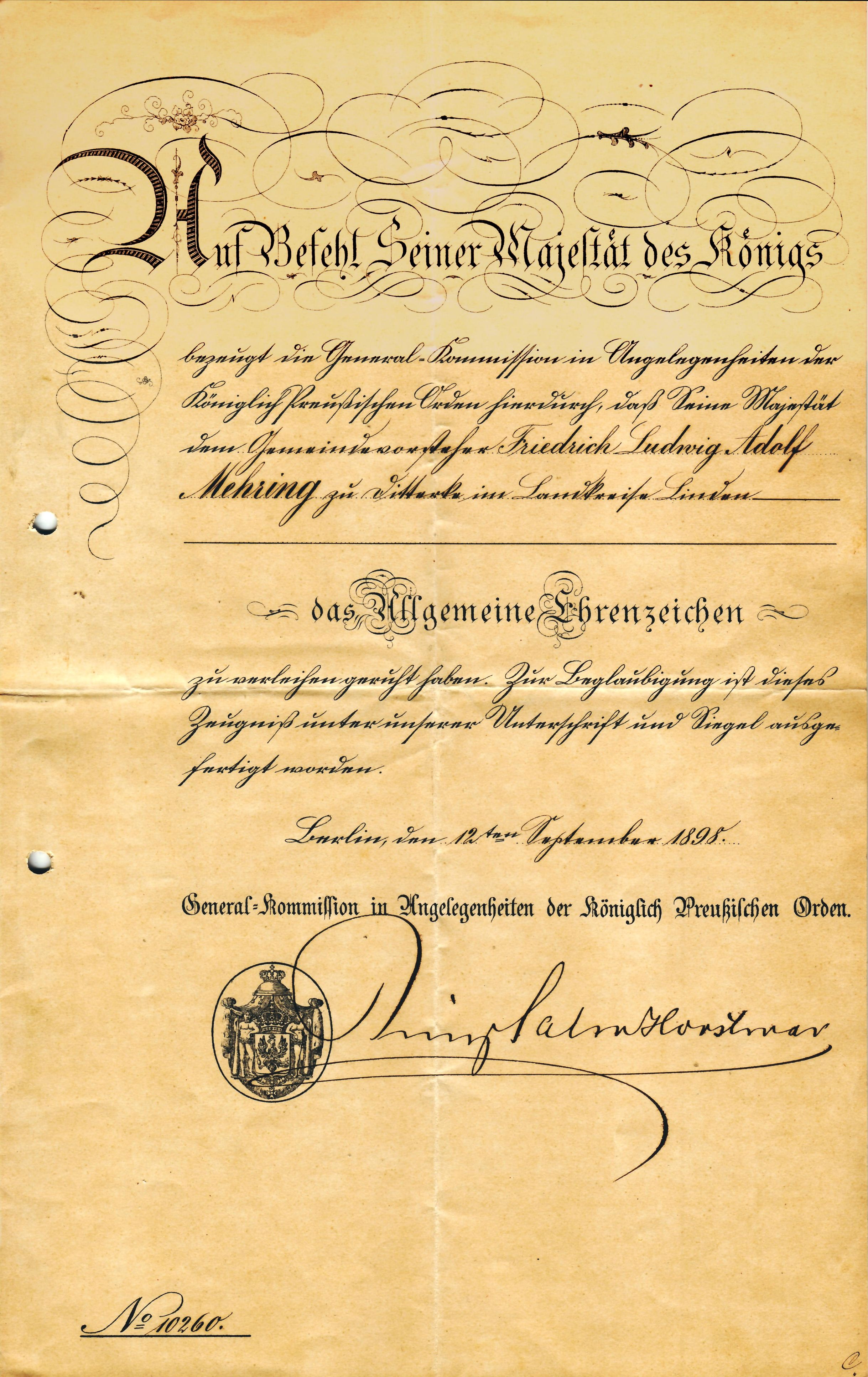 Ditterkes Ortsvorsteher (= Bürgermeister nach heutiger Bezeichnung) Friedrich Ludwig Adolf Mehring (6. Februar 1831 in Ostermunzel - 19. September 1900 in Ditterke) war Landwirt und hatte einen Vollmeierhof (heute Bundesstraße 10). Er erhielt am 12. September 1898 vom preußischen König einen Orden, das Allgemeine Ehrenzeichen. Der Text der Urkunde lautet:Auf Befehl seiner Majestät des Königs bezeugt die General-Kommission in Angelegenheiten derKöniglich-Preußischen Orden hierdurch, daß seine Majestätdem Gemeindevorsteher Friedrich Ludwig AdolfMehring zu Ditterke im Landkreise Lindendas Allgemeine Ehrenzeichenzu verleihen geruht haben. Zur Beglaubigung ist diesesZeugnis unter unserer Unterschrift und Siegel ausge-fertigt worden.Berlin, den 12ten September 1898General-Kommission in Angelegenheiten der Königlich Preußischen OrdenPrinz Salm Horstmar.Die Urkunde trägt die Nummer 10260